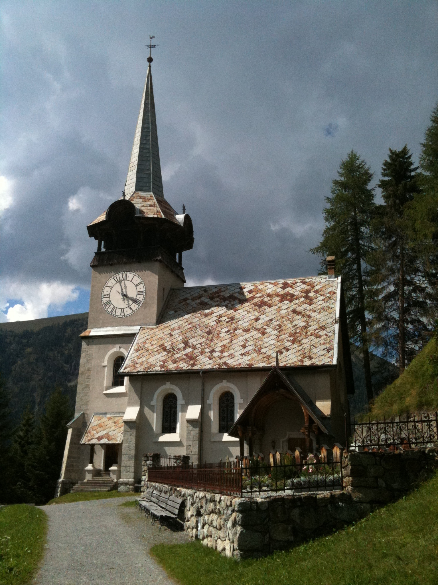 reformierte Kirche Davos Monstein, Kanton Graubünden